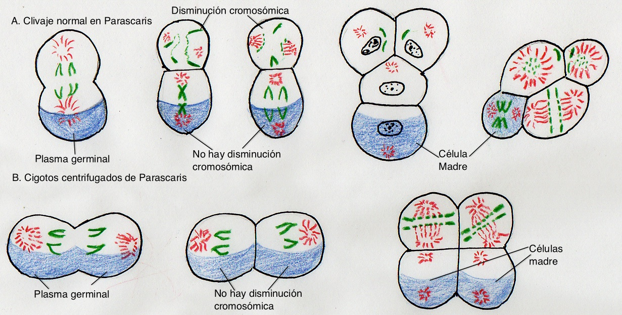 Distribución del plasma germinal durante el clivaje en parascarias en A. un cigoto normal y B. un cigoto centrífugado.